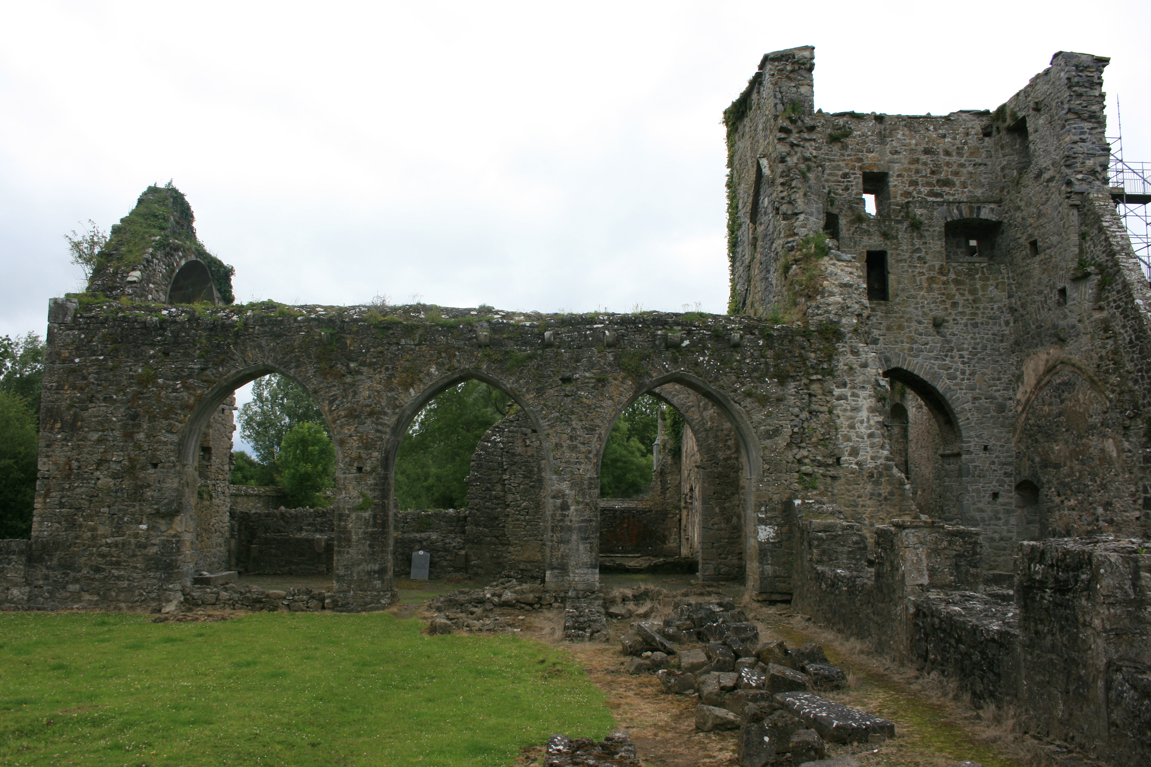 Chiesa abbaziale, Kells Priory, Irlanda.